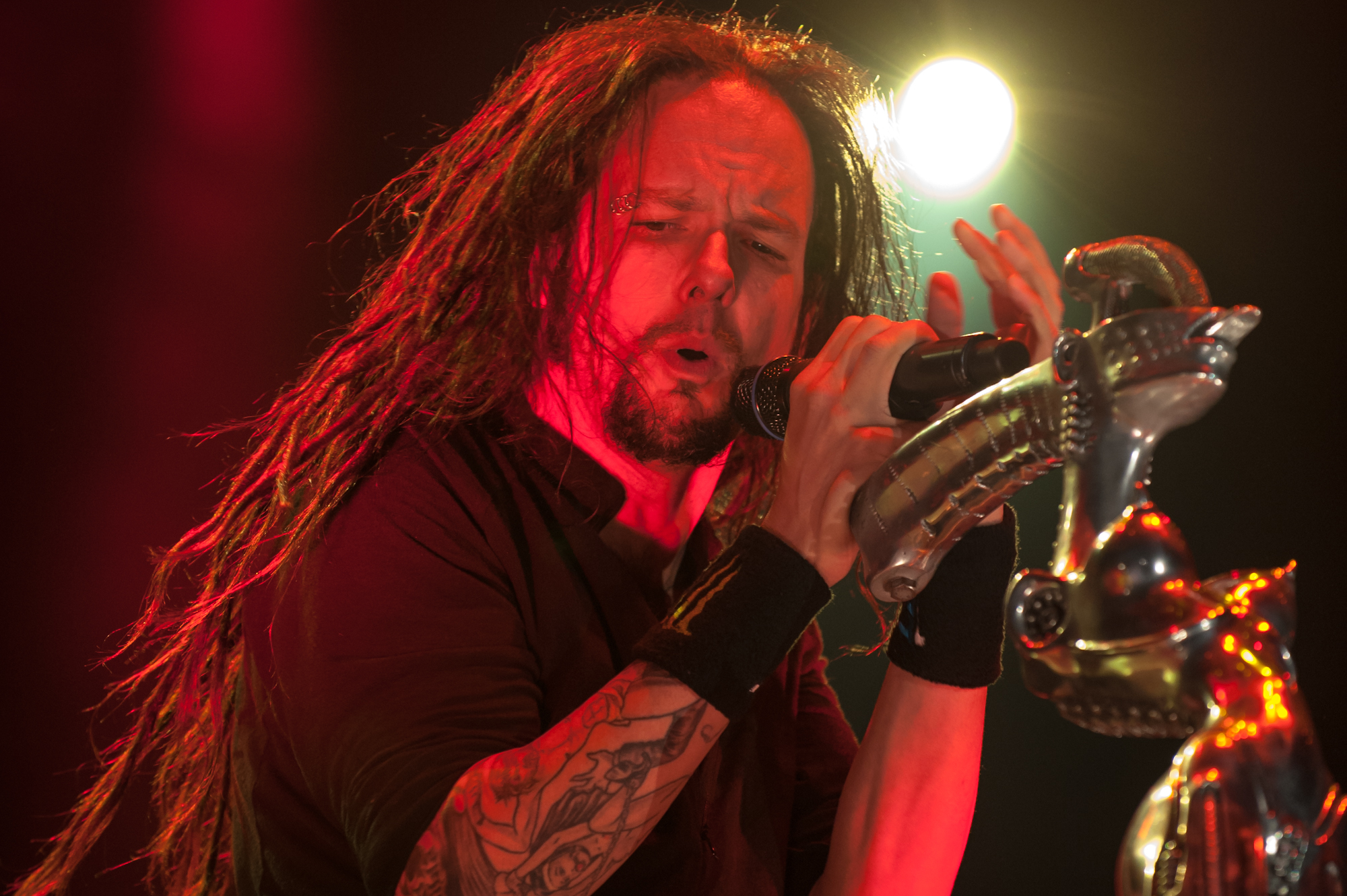 Jonathan Davis, Sänger von Korn beim Festival, Rocco del Schlacko 2012.